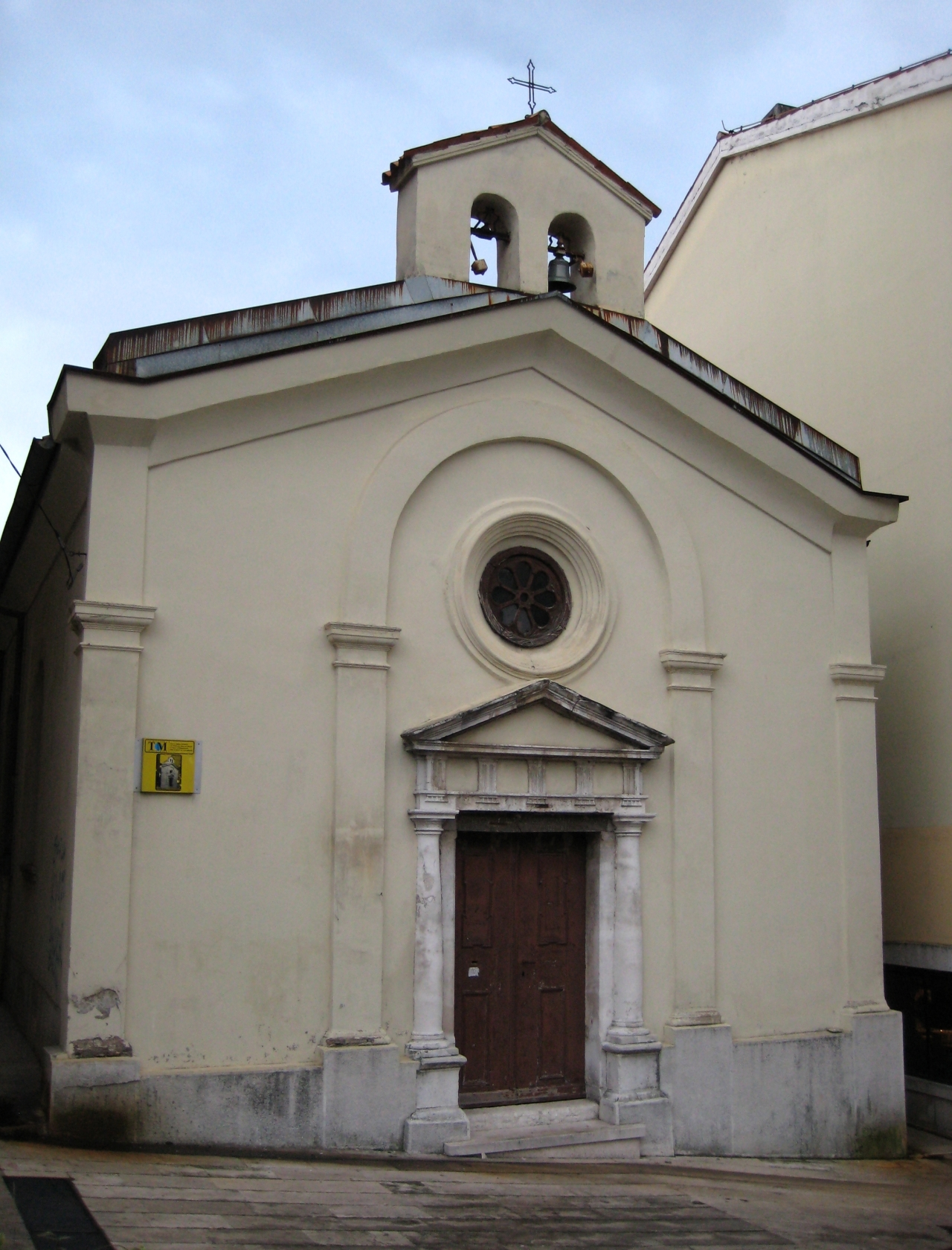 Crkva sv. Fabijana i Sebastijana u Rijeci.